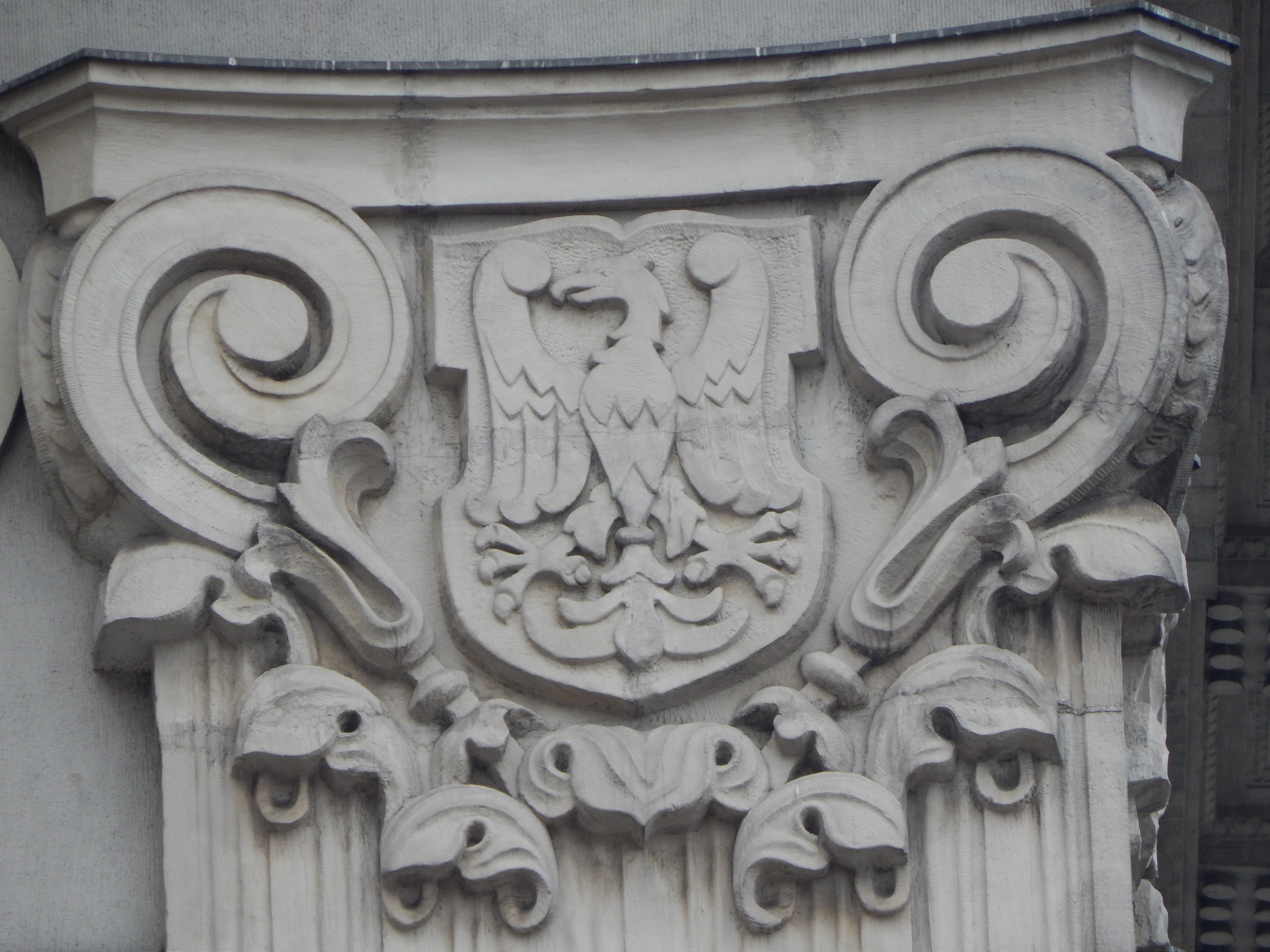 Fragment elewacji gmachu Sejmu Śląskiego - herb 1